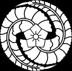 「藤巴の中に桔梗」紋（染抜）